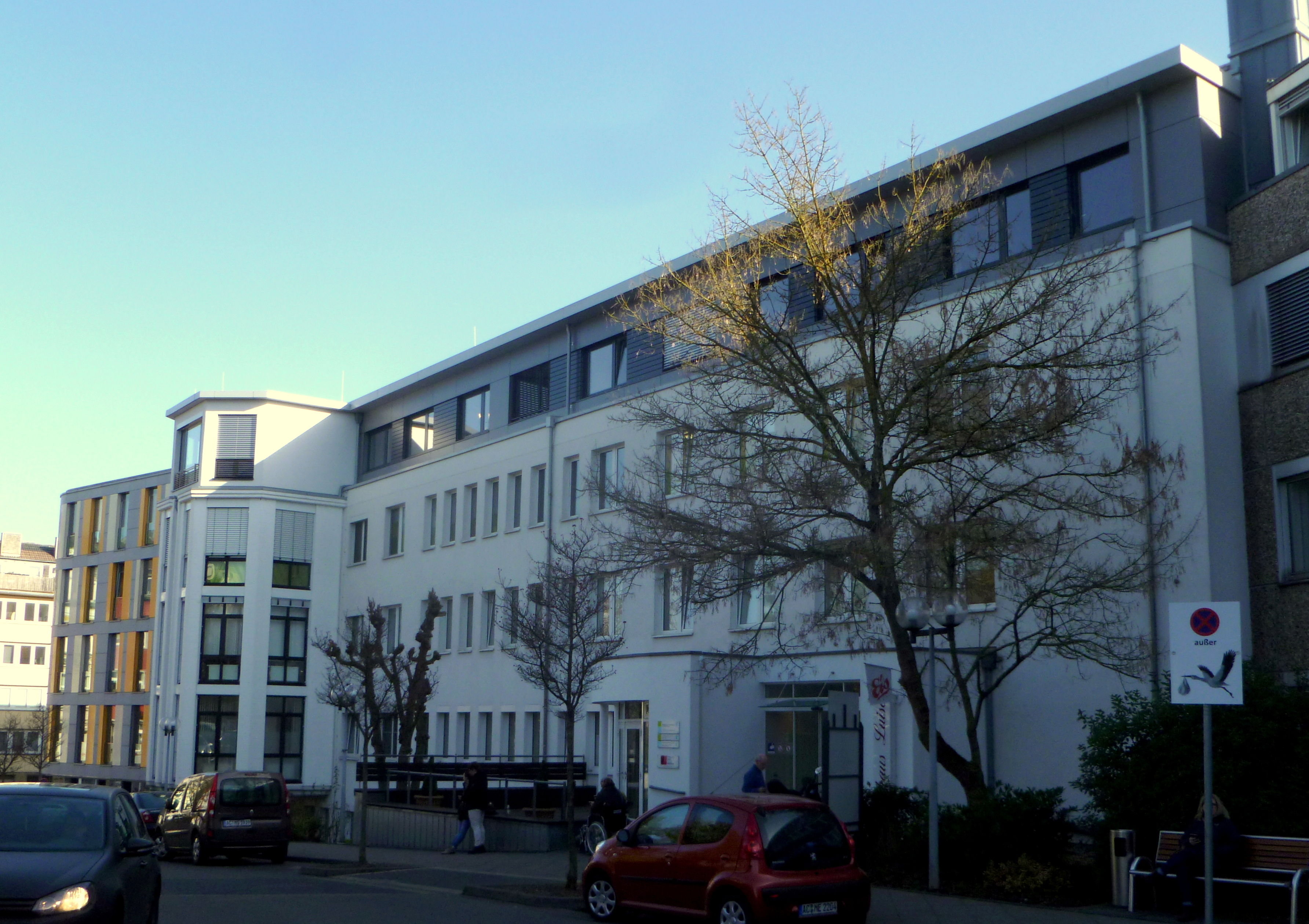 Altenkrankenhaus und Reha-Klinik Haus Cadenbach am Luisenhospital Aachen